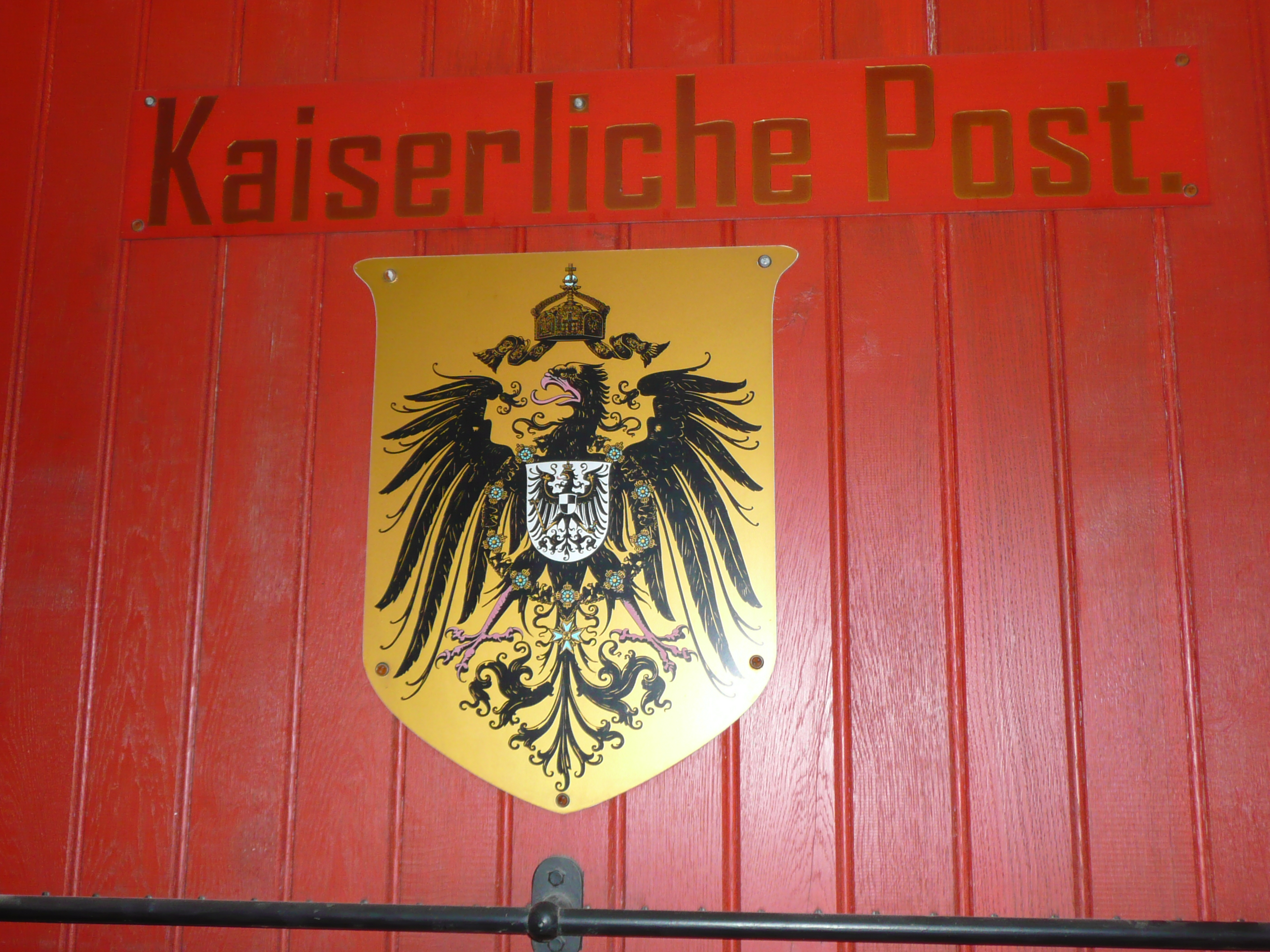 Wappen der kaiserlichen Post auf einem Postwagen der Schmalspurbahn in Sachsen